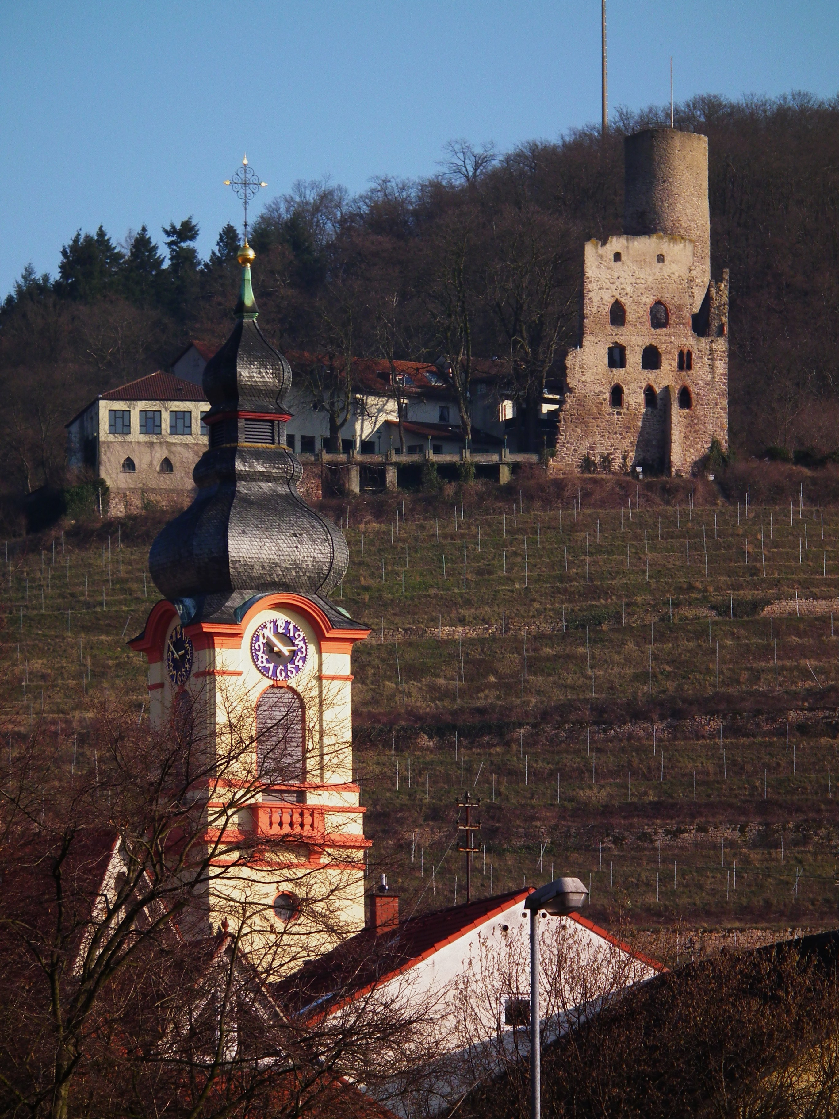 Turm der katholischen Kirche Maria-Himmelfahrt und die Burgruine Strahlenburg in Schriesheim (Baden-Württemberg, Deutschland)